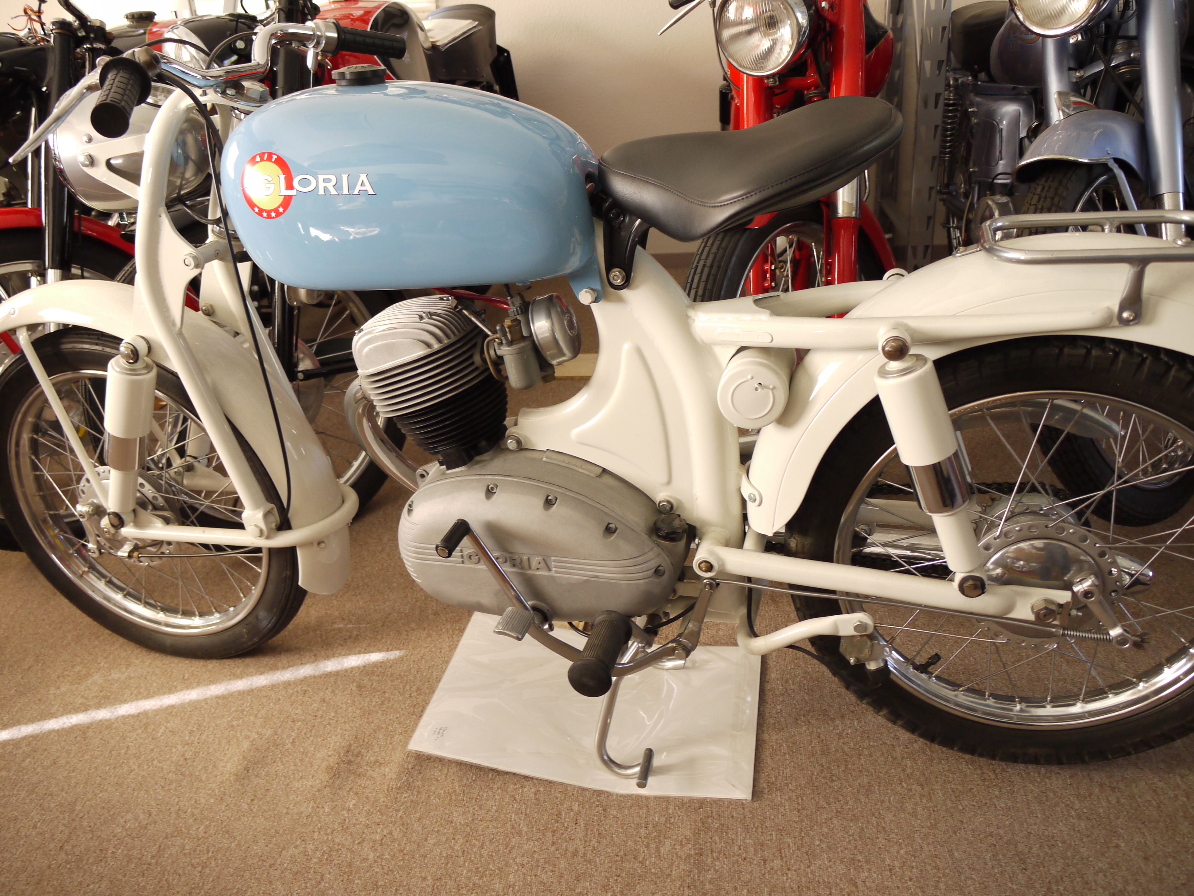 AMF Gloria 160 del 1954, con propulsore a 4 tempi, telaio in acciaio a struttura mista tubolare-lamierato e forcella Earles.